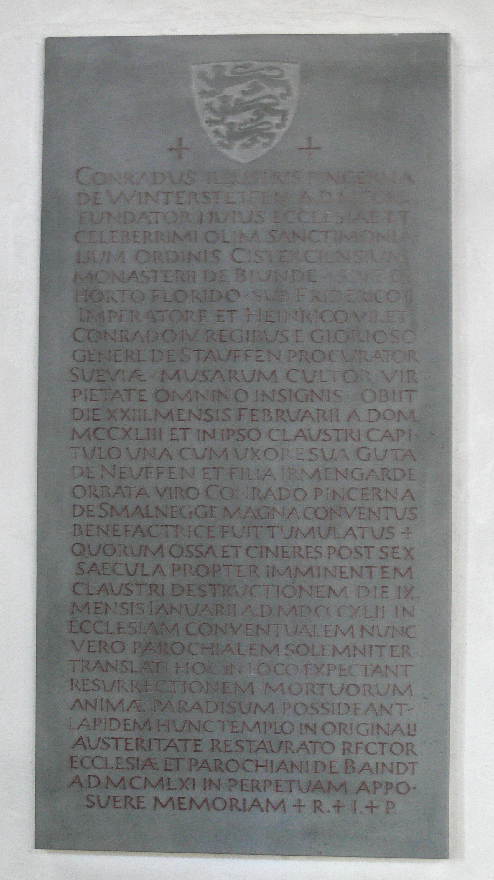 Pfarrkirche St. Johannes Baptist (ehem. Klosterkirche Unserer Lieben Frau), Baindt, Landkreis Ravensburg Gedenkplatte für Schenk Konrad von Winterstetten, errichtet 1961